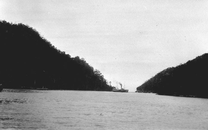 Foto. Een schip in een baai van Tifoe op Boeroe, Molukken